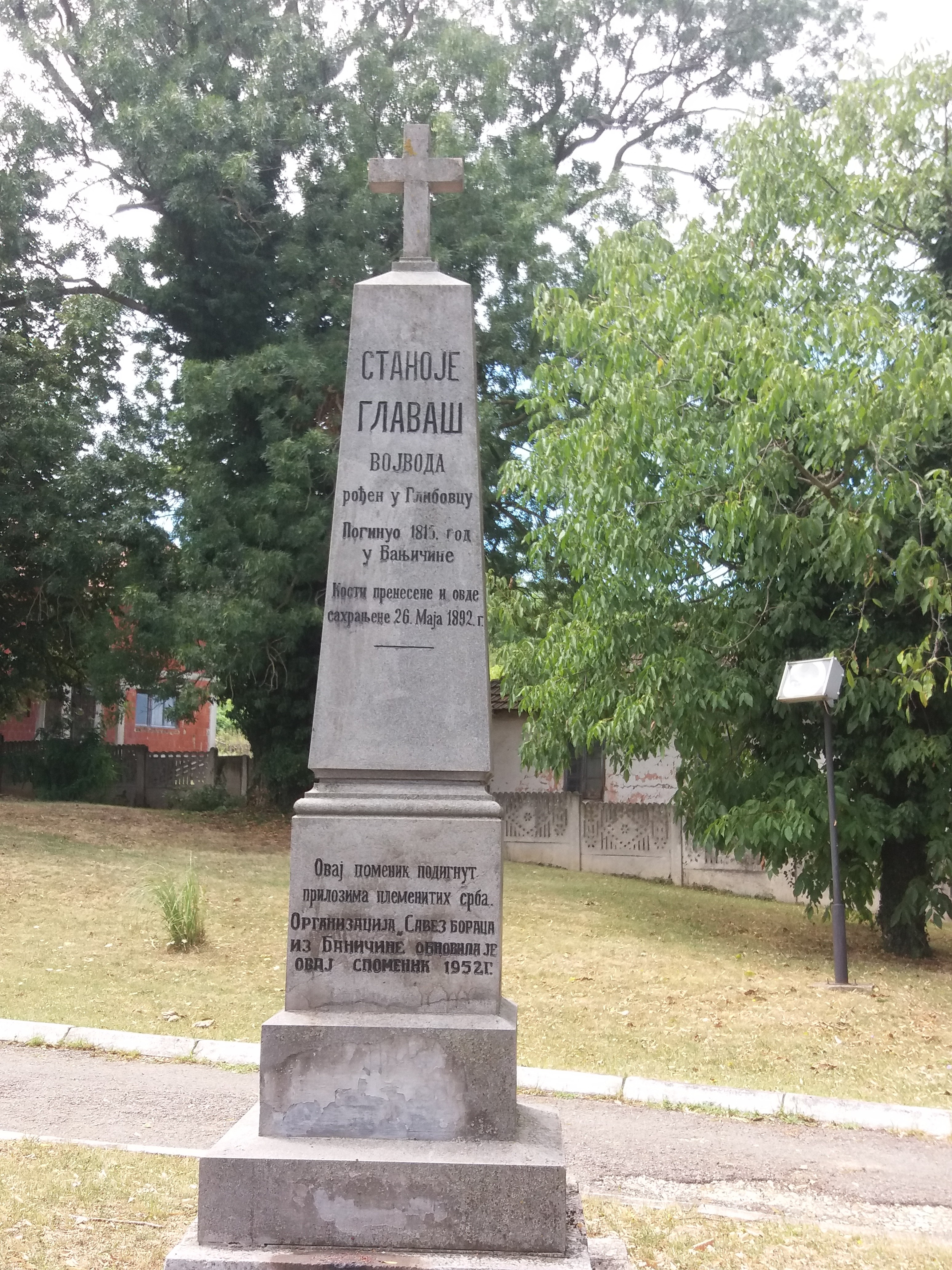 Spomenik Stanoju Glavašu Baničina